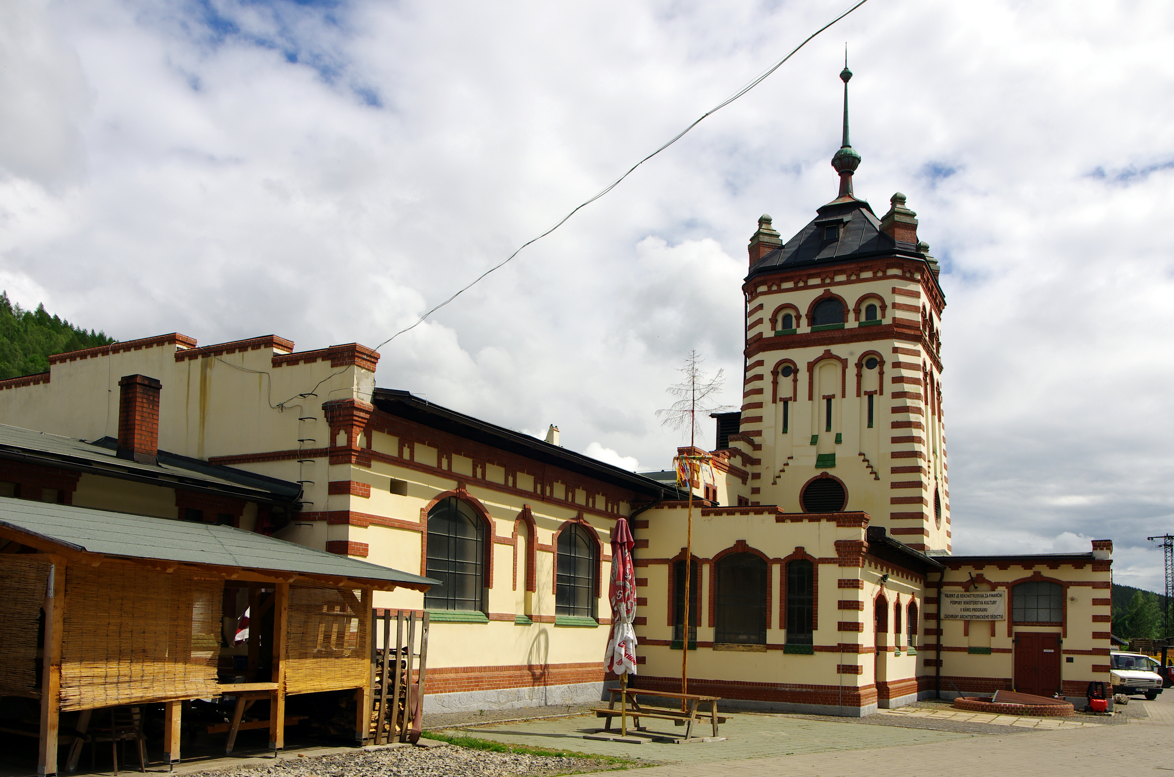 Městská jatka, Kraslice 1928, Kraslice (okres Sokolov).